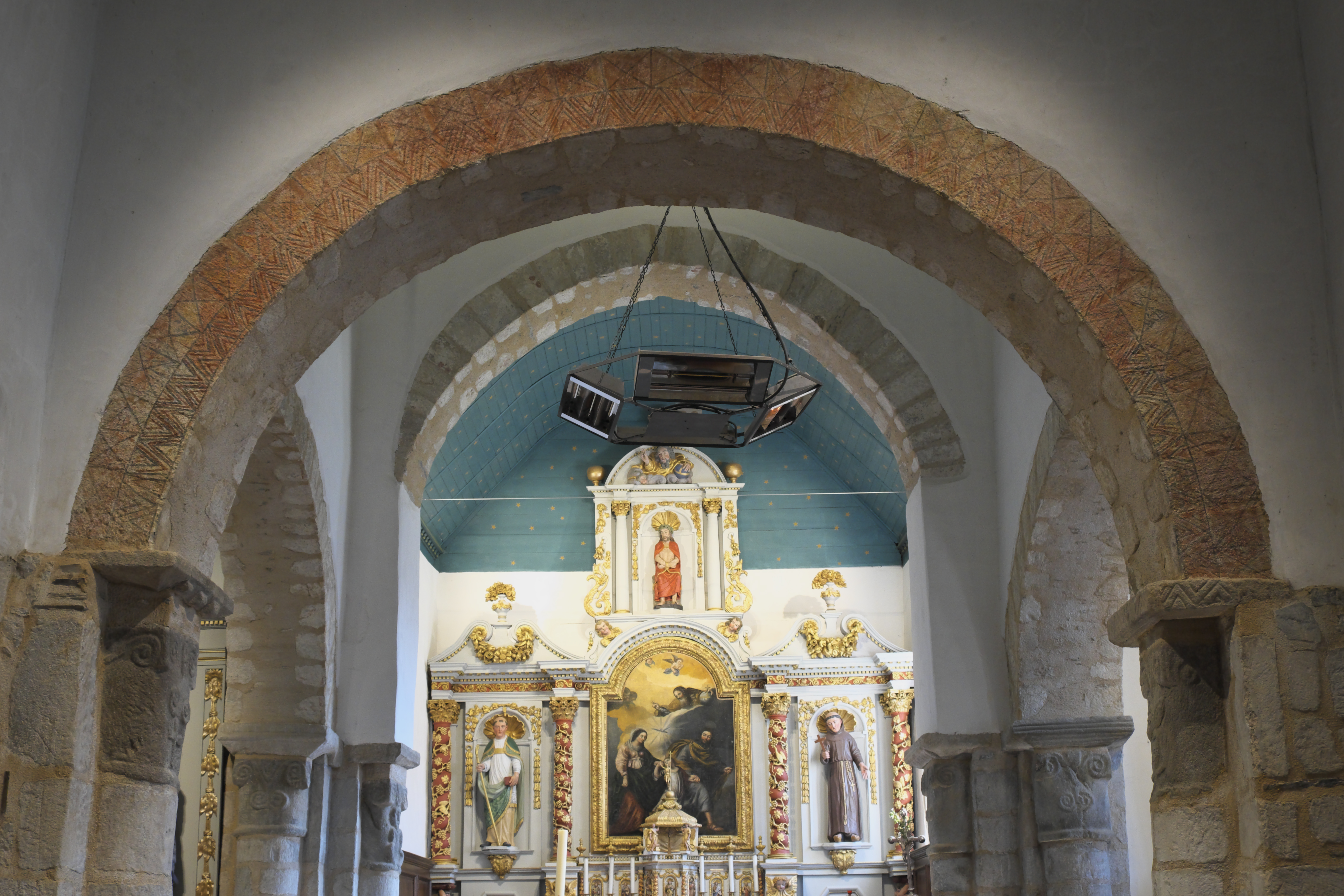 Katholische Pfarrkirche Saint-Guénolé in Locquénolé im Département Finistère (Region Bretagne/Frankreich), Innenraum